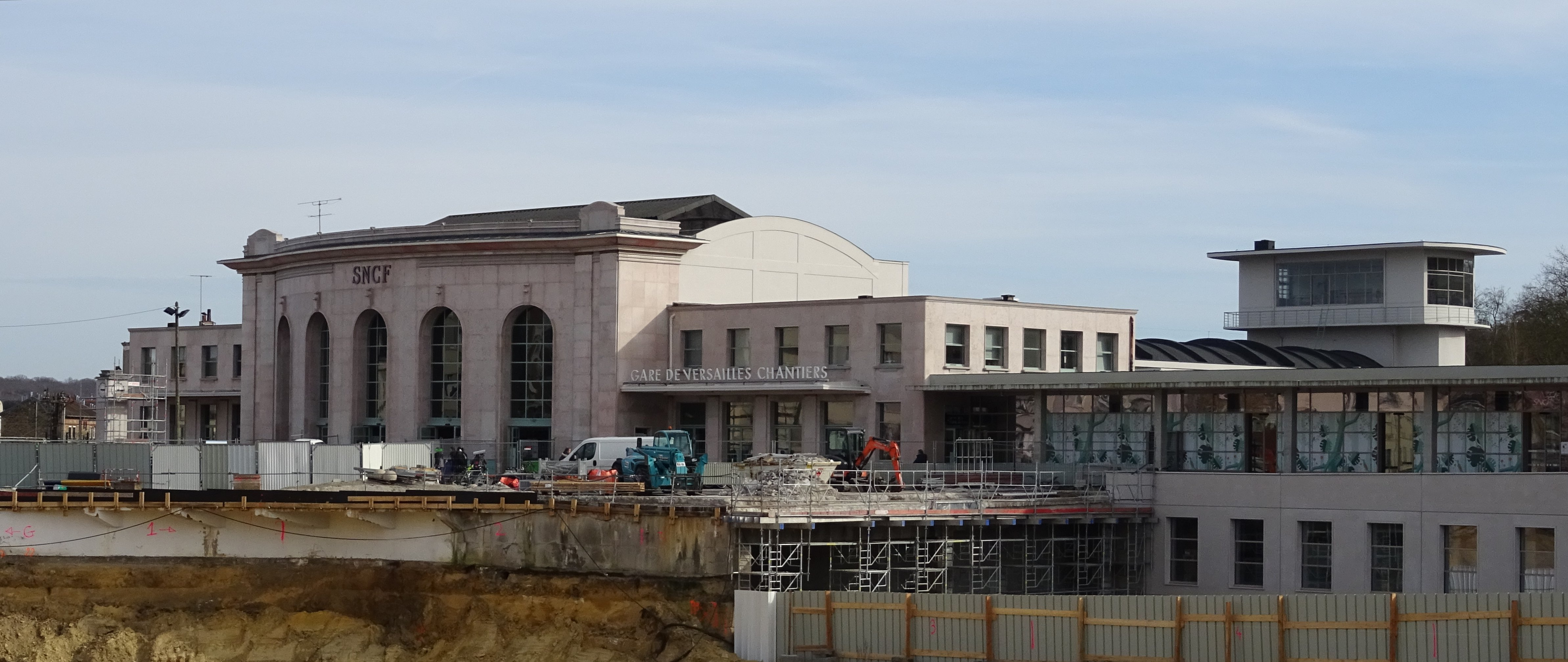 Bâtiments ancien+neuf de la gare de Versailles Chantiers